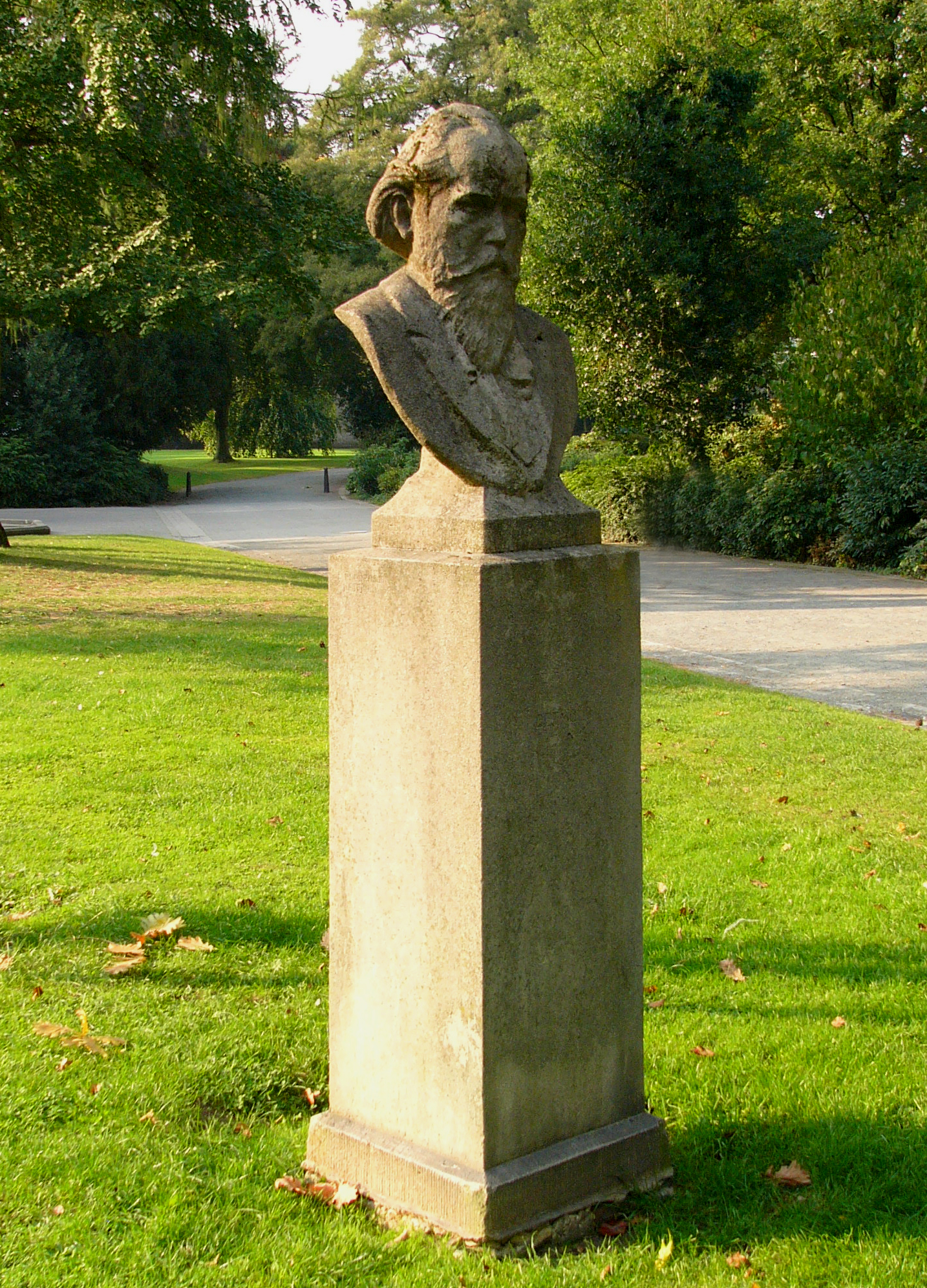 Johannes-Brahms-Skulptur auf dem Schlossplatz in Detmold, Deutschland